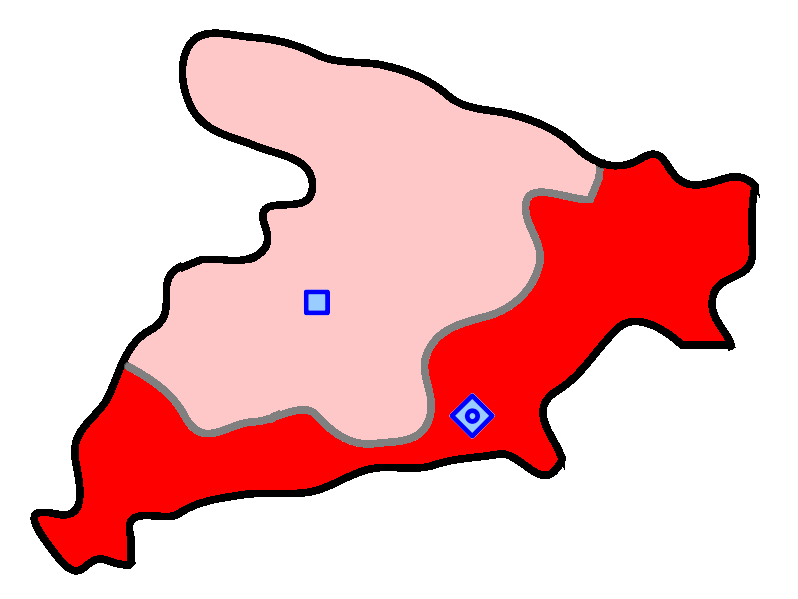 حوزهٔ انتخاباتی کرج برای انتخابات مجلس شورای اسلامی